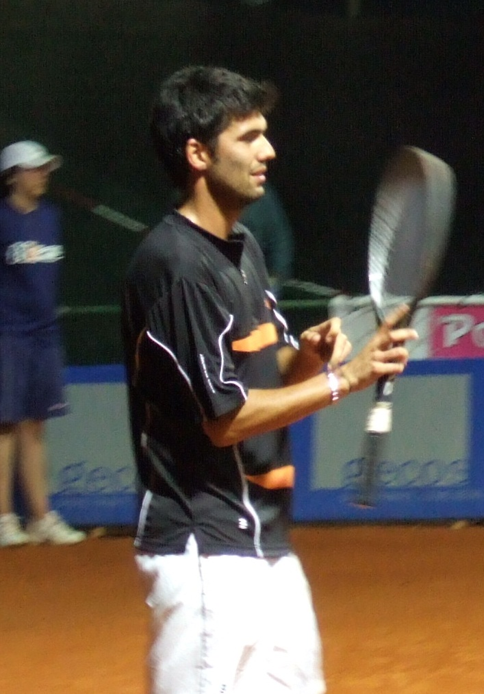 Leonardo Azzaro al Riviera di Rimini Challenger 2006, 1° Turno, contro Nicolas Devilder.